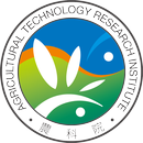 農業科技研究院Logo